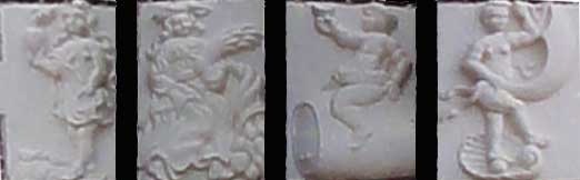 Reliëfs Noorderhaven 106 in Harlingen